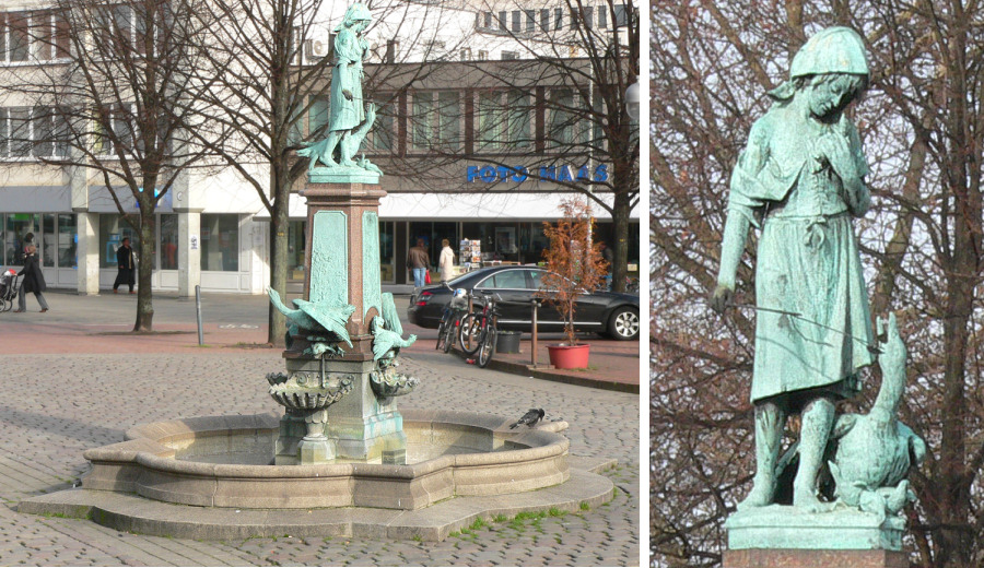 Gänseliesel-Brunnen auf dem Steintor-Platz Hanover. Foto aufgenommen von Benutzer Benutzer:AxelHH, Februar 2007